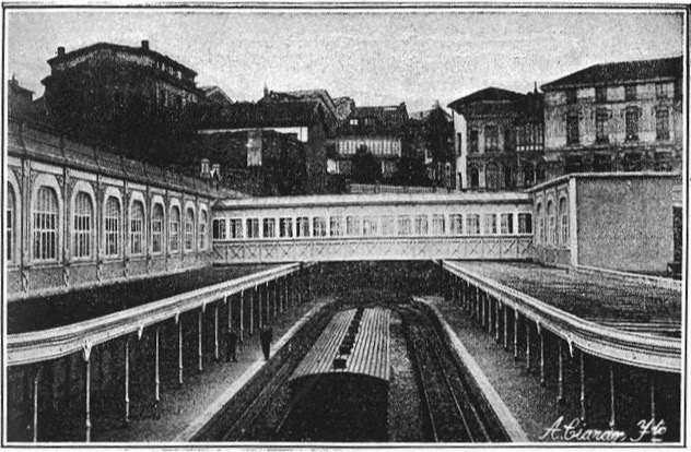 Fotograbado de los andenes de viajeros de la estación de Oviedo del Vasco, publicada en Turismo - Asturias : (guía para el turista) (1914), pág. 39